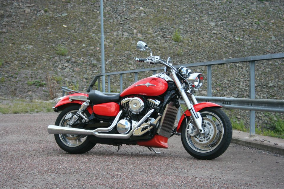 Kawasaki Mean Streak 2005 års modell. Magma röd med extrautrustning.